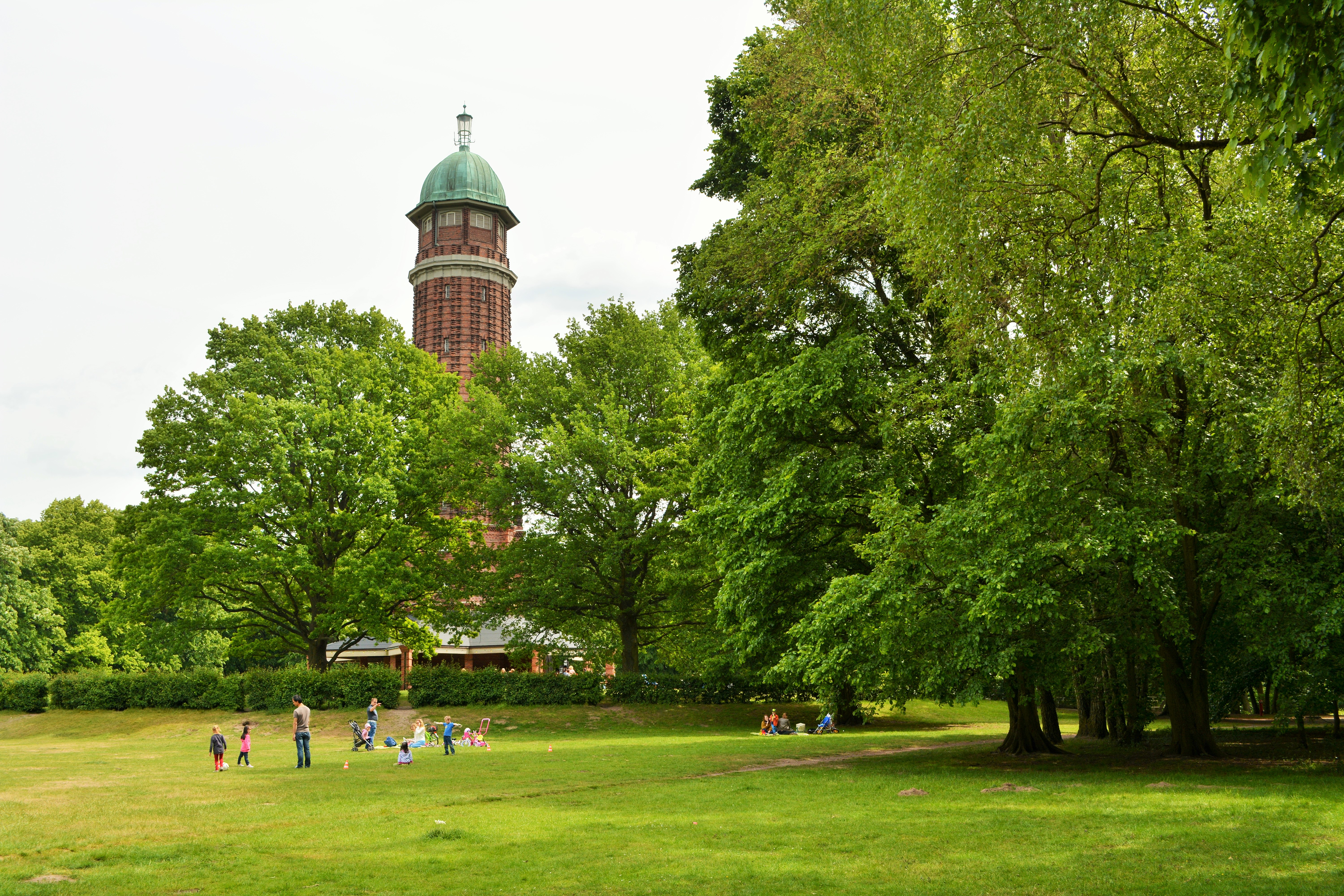 Blick auf den Wasserturm von der Westseite des denkmalgeschützten Volksparks Jungfernheide in Berlin-Charlottenburg